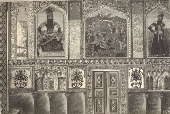 Часть стены сардарского дворца в Эривани